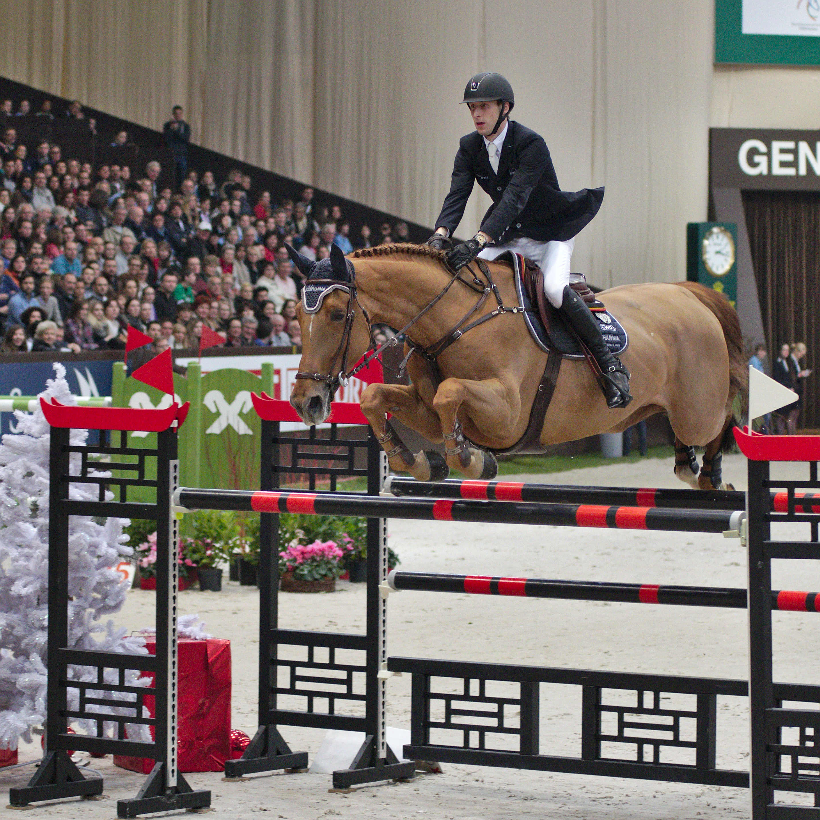 CHI Genève 2013 - 20131215 - Pieter Devos et Candy